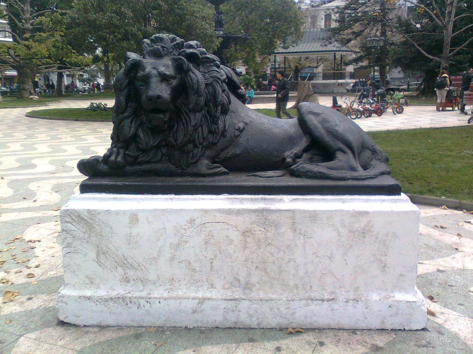 Uno de los dos Leones d la Plaza Victoria de Valparaíso